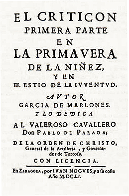 Portada de la primera parte de El Criticón (Zaragoza, Juan Nogués, 1651) de Baltasar Gracián.